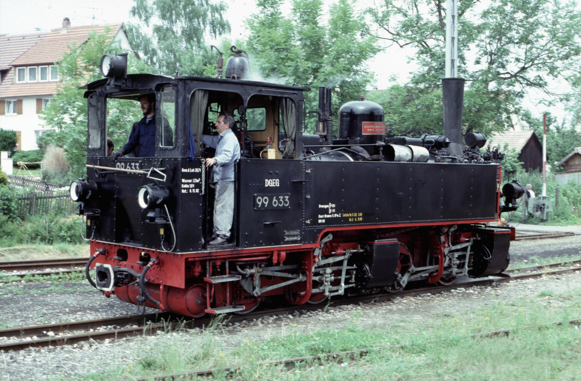 Ochsenhausen 06. Juli 1985 99 633 würt. Tssd